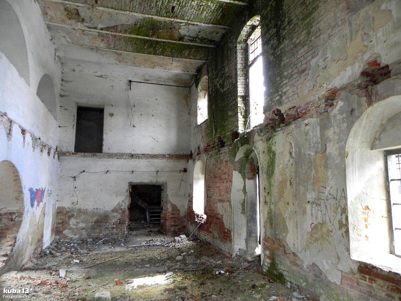 Wnętrze cieszanowskiej synagogi w rok po mojej poprzedniej wizycie. Ten stan nie daje nadziei, że ten obiekt uchroni się przed rozbiórką.